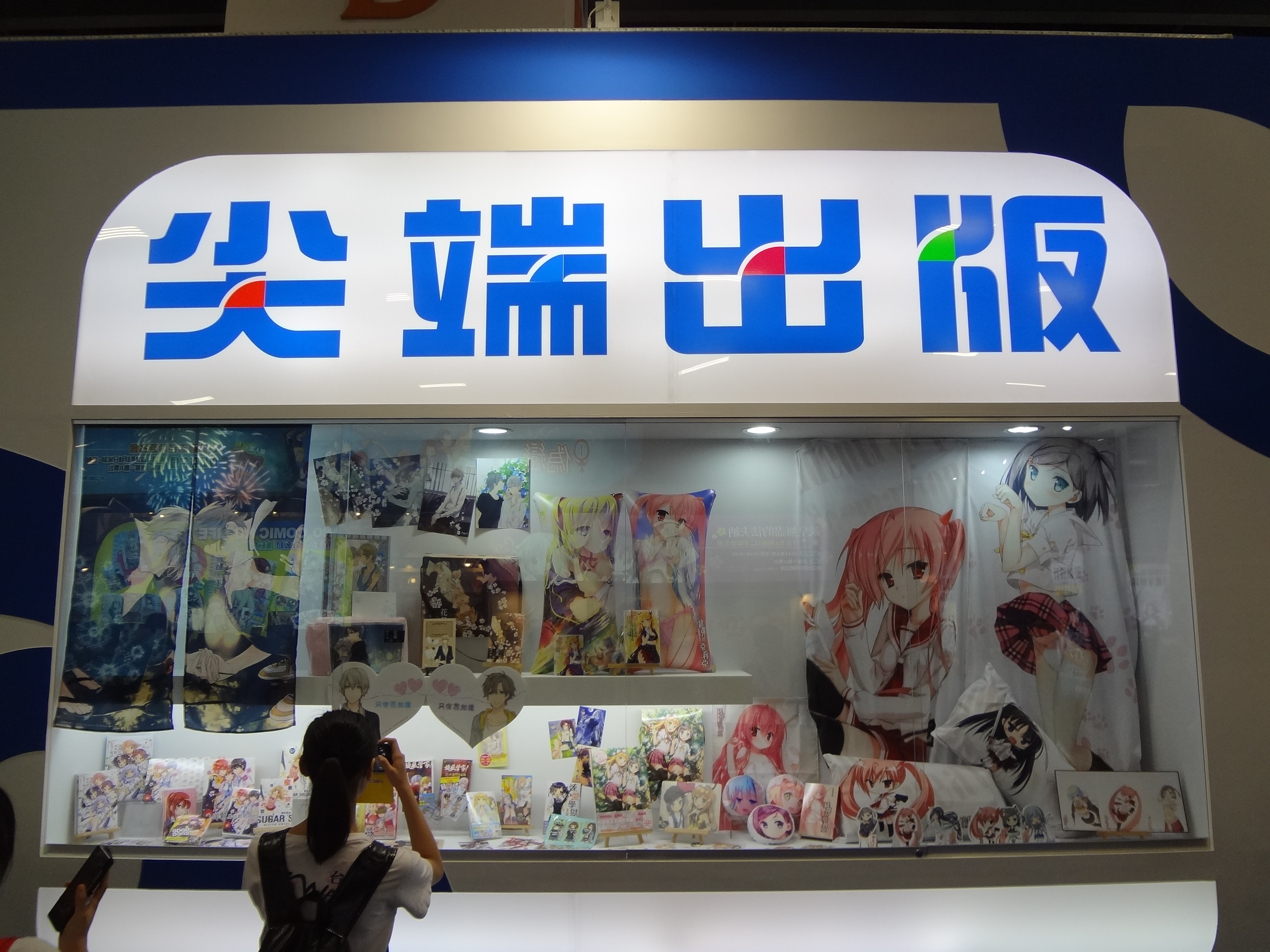 2014年漫畫博覽會，尖端出版攤位精品展示窗。